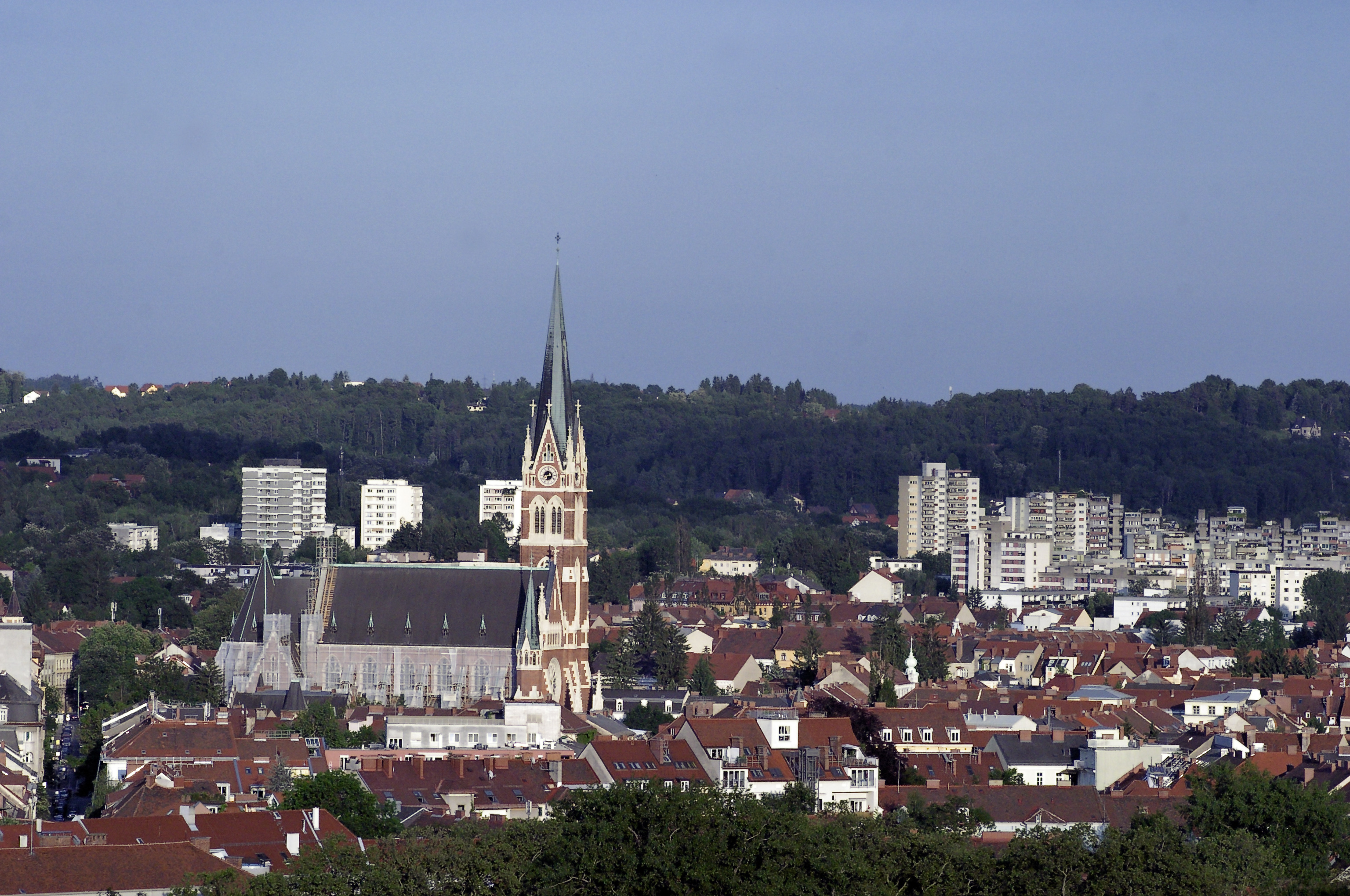 Herz-Jesu-Kirche in Graz (Austria)